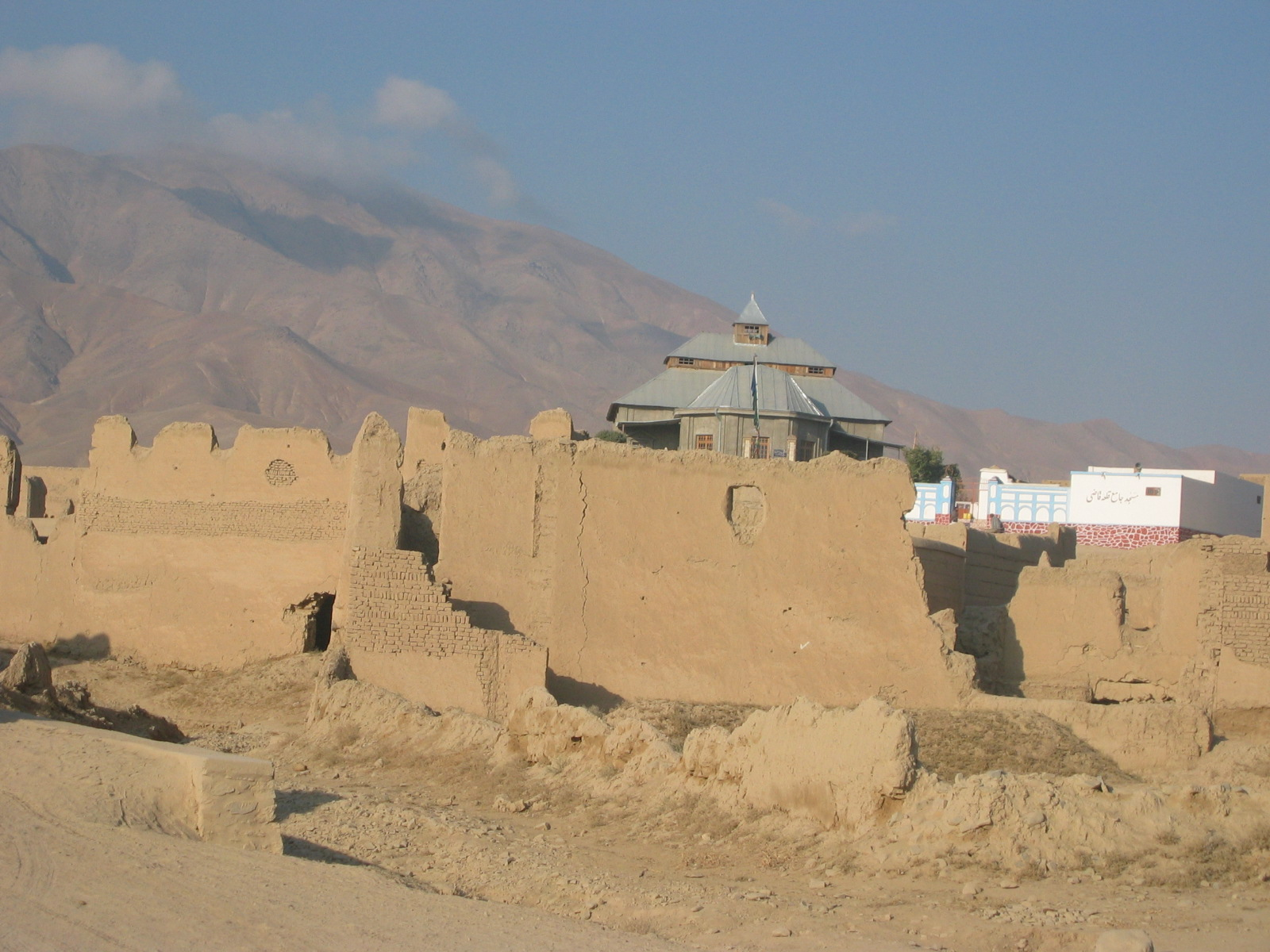 Pol-e-Khomri, Afghanistan